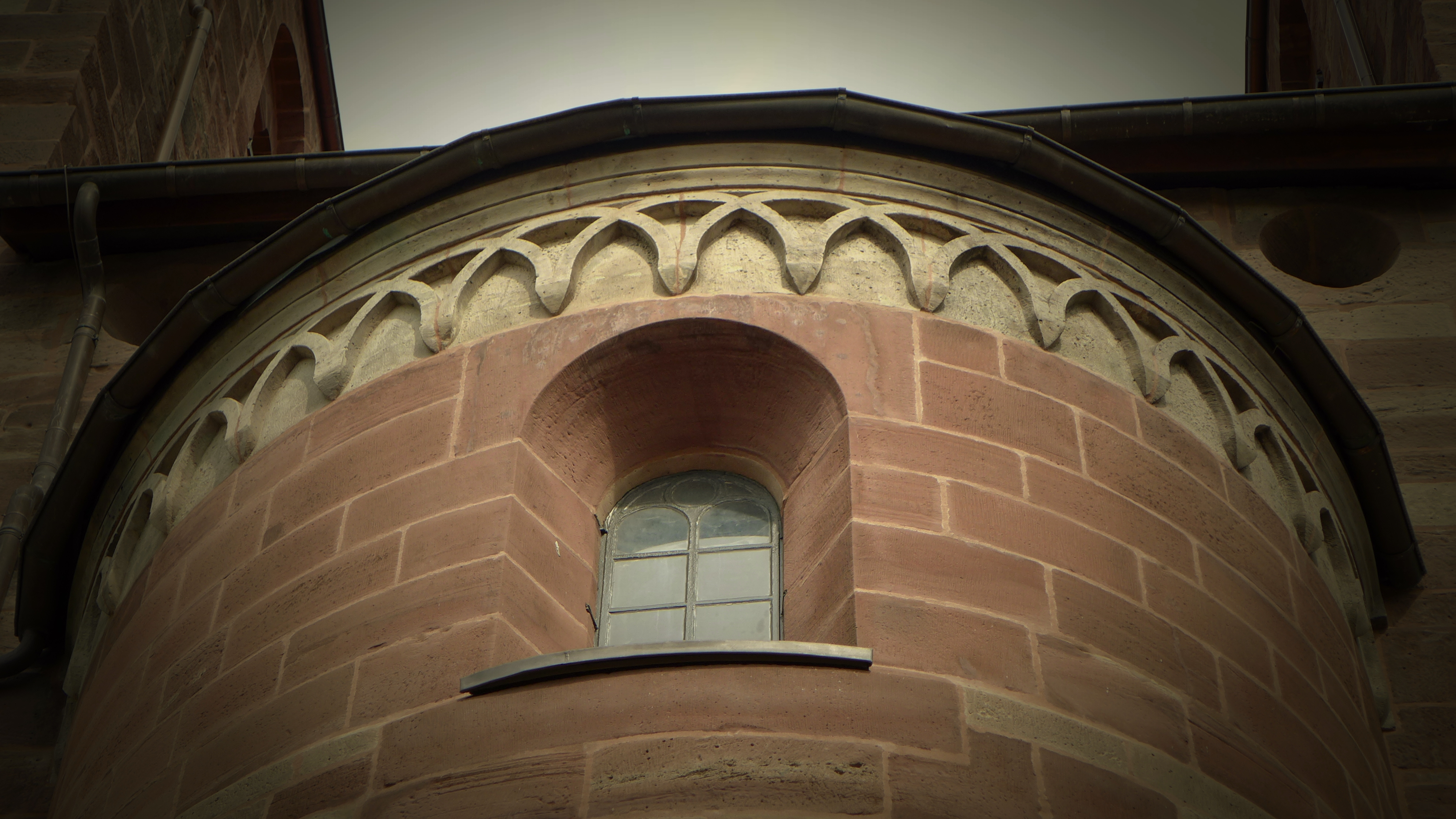 Ehemalige Klosterkirche St. Blasii und Marien in Fredelsloh (Niedersachsen), oberer Abschluss der Westapsis aus rotem Sandstein